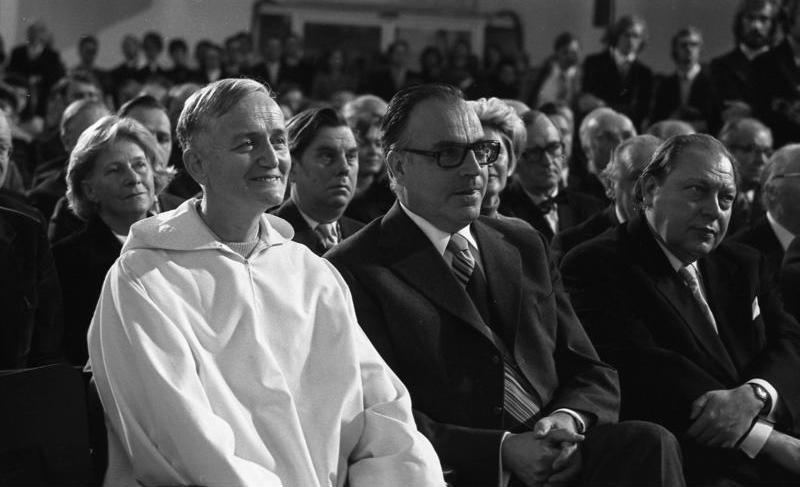 Der Friedenspreis des Börsenvereins des Deutschen Buchhandels wird an den Gründer und Prior der ökumenischen Bruderschaft von Taize, Roger Schütz, durch den Vorsteher des Börsenvereins Dr. Ernst Klett in Anwesenheit von Bundespräsident Walter Scheel in der Pauls-Kirche überreicht. (Mitte: Helmut Kohl, rechts: Schmitt-Vockenhausen)